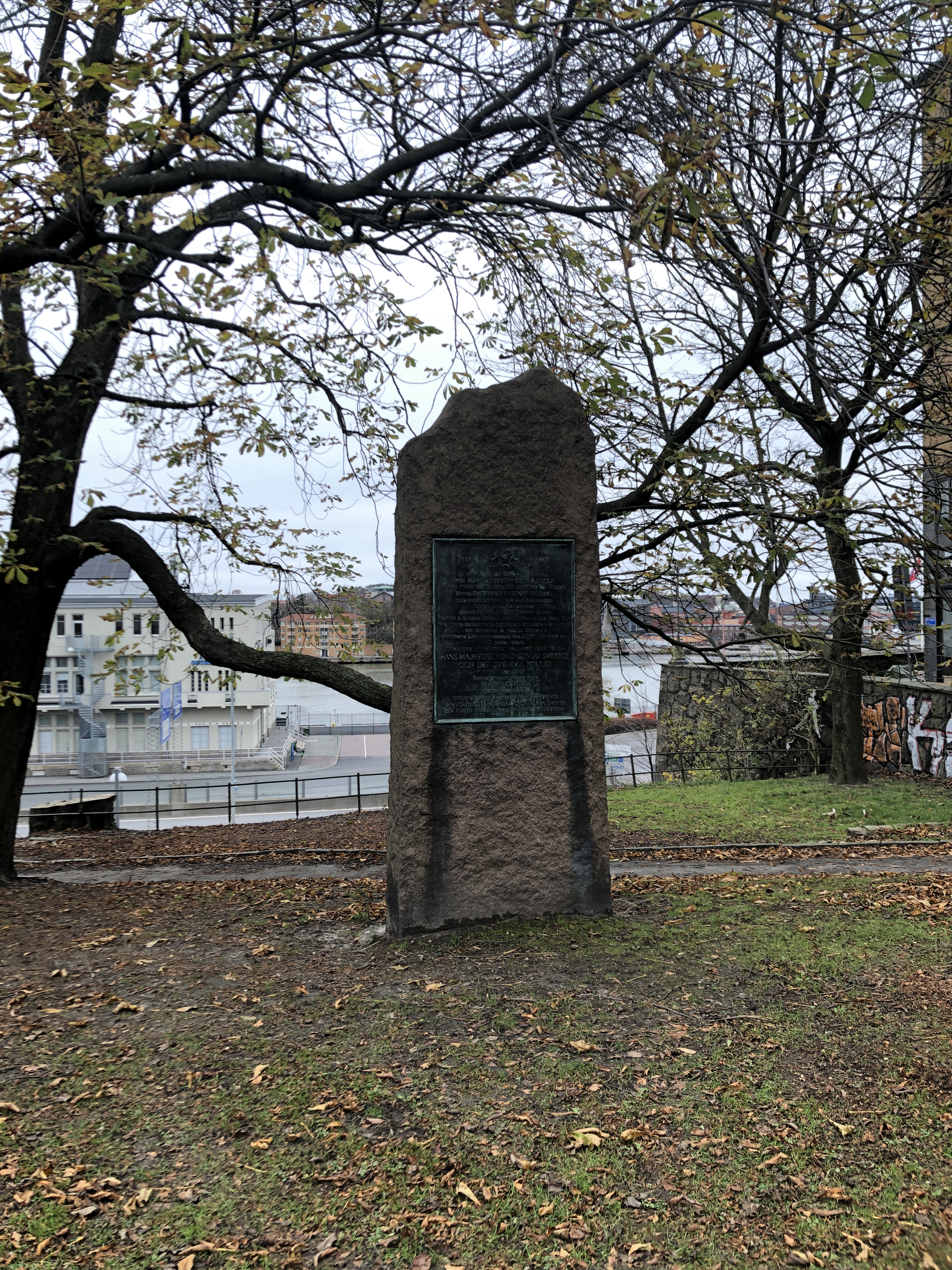 Amerikamonumentet vid Sjöfartsmuseet i Göteborg, invigt 1937 till åminnelse av den svenska kolonin Nya Sverige i Nordamerika.